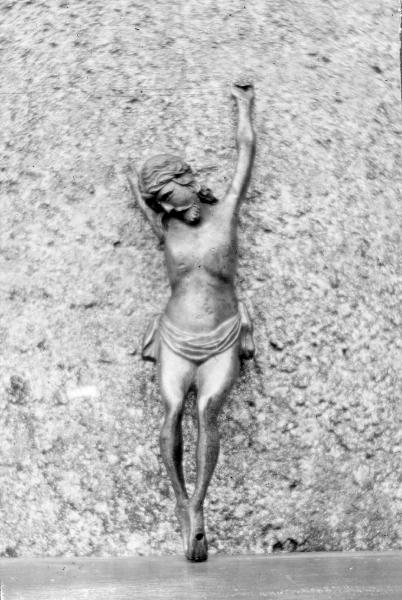 Kristusfigur av koppar, 1600- eller 1700-talet. Snabbinv. Kategori: (05) KrucifixKristusfigur av koppar, 1600- eller 1700-talet. Snabbinv.